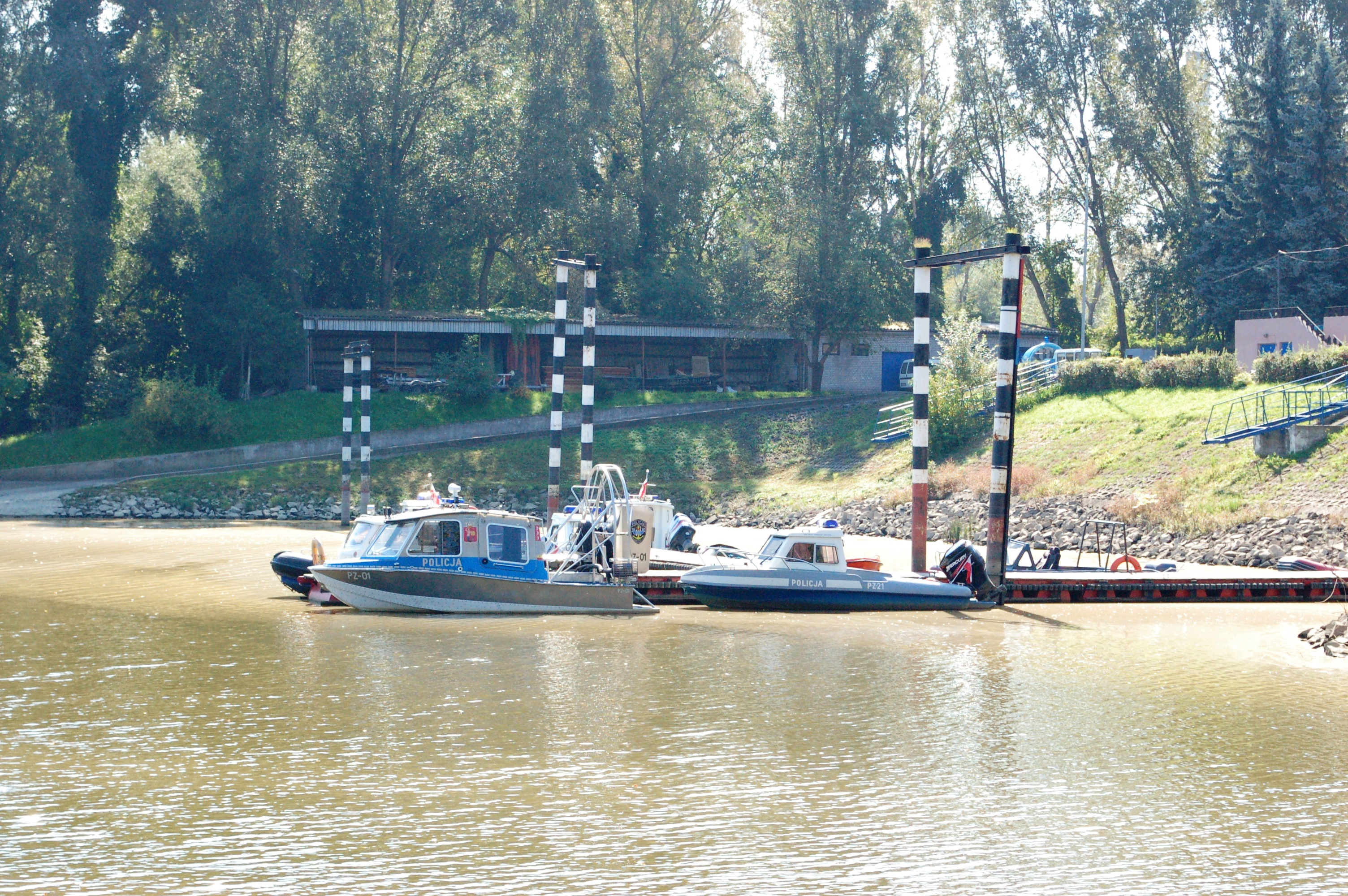 Hafen Praga, Warschau